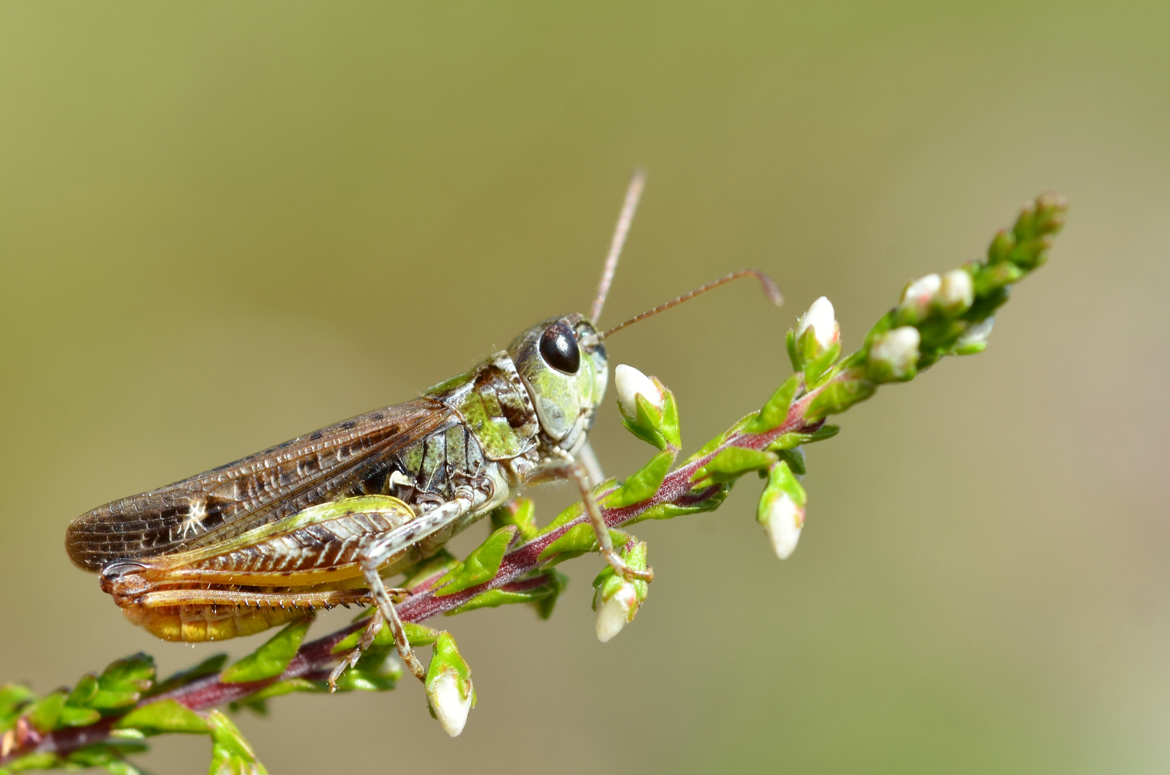 Myrmeleotettix maculatus male